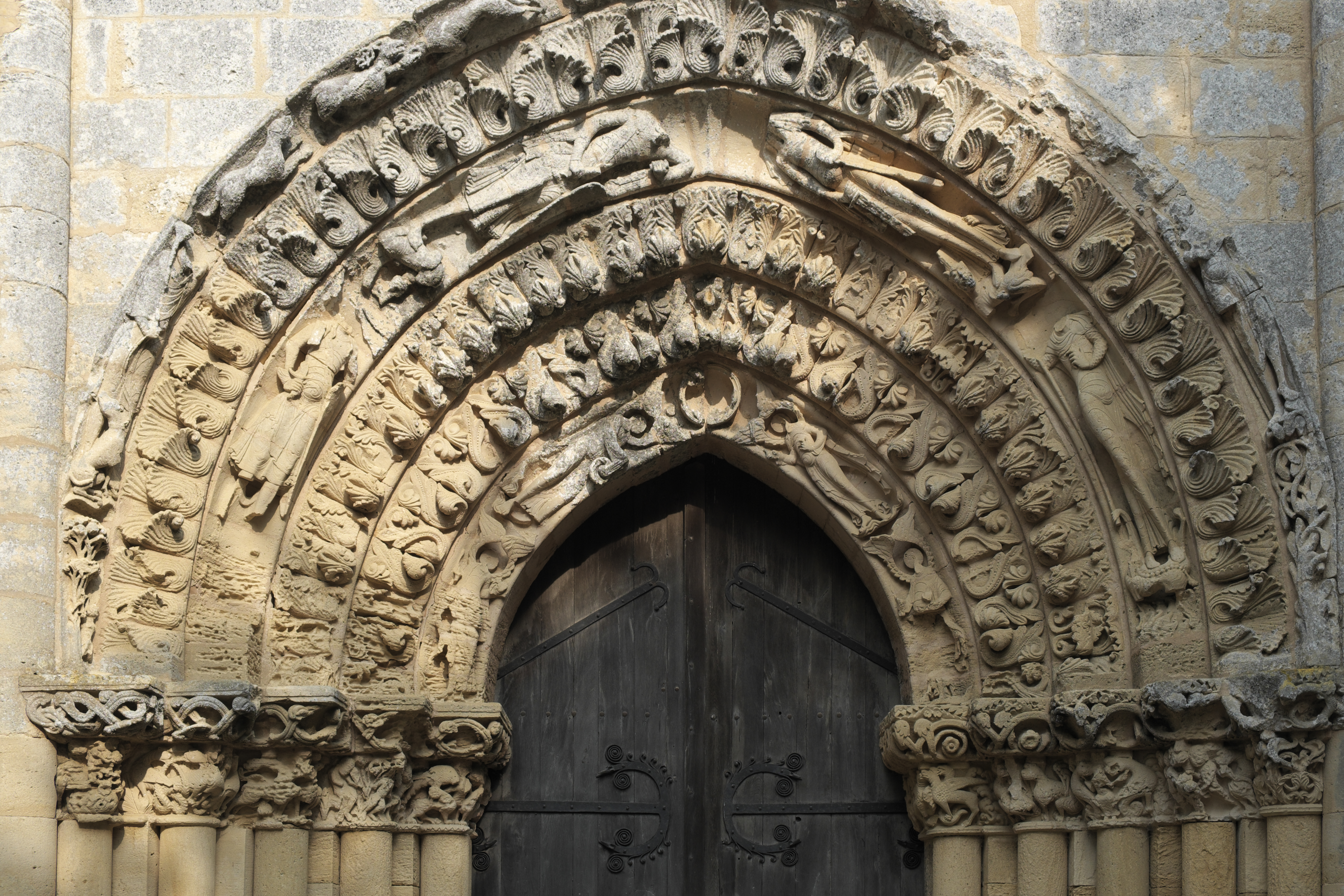 Ehemalige Benediktinerabtei Saint-Nicolas in Blasimon im Département Gironde (Région Aquitaine/Frankreich), romanisches Archivoltenportal